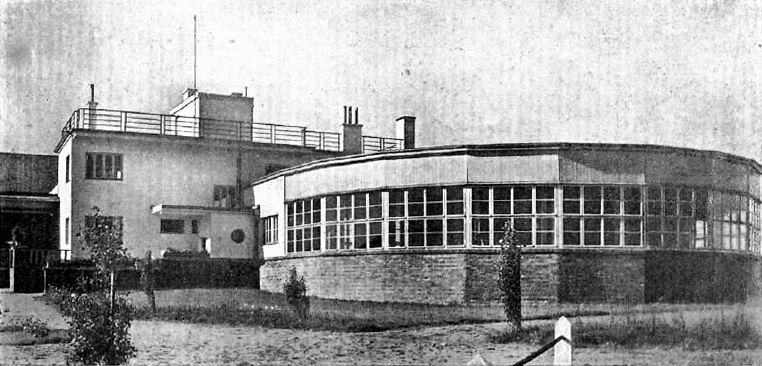 Władysławowo Cetniewo - dawne kasyno oficerskie